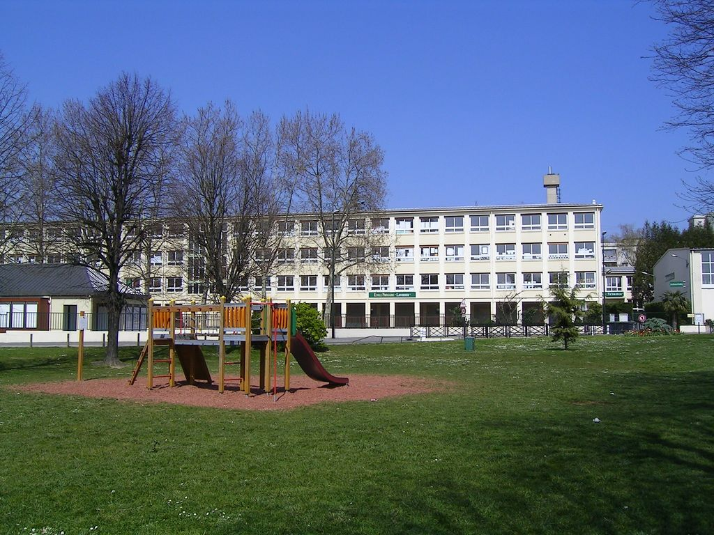 École primaire Lavoisier, quartier Le Chénay Photo personnelle (own work) de Marianna